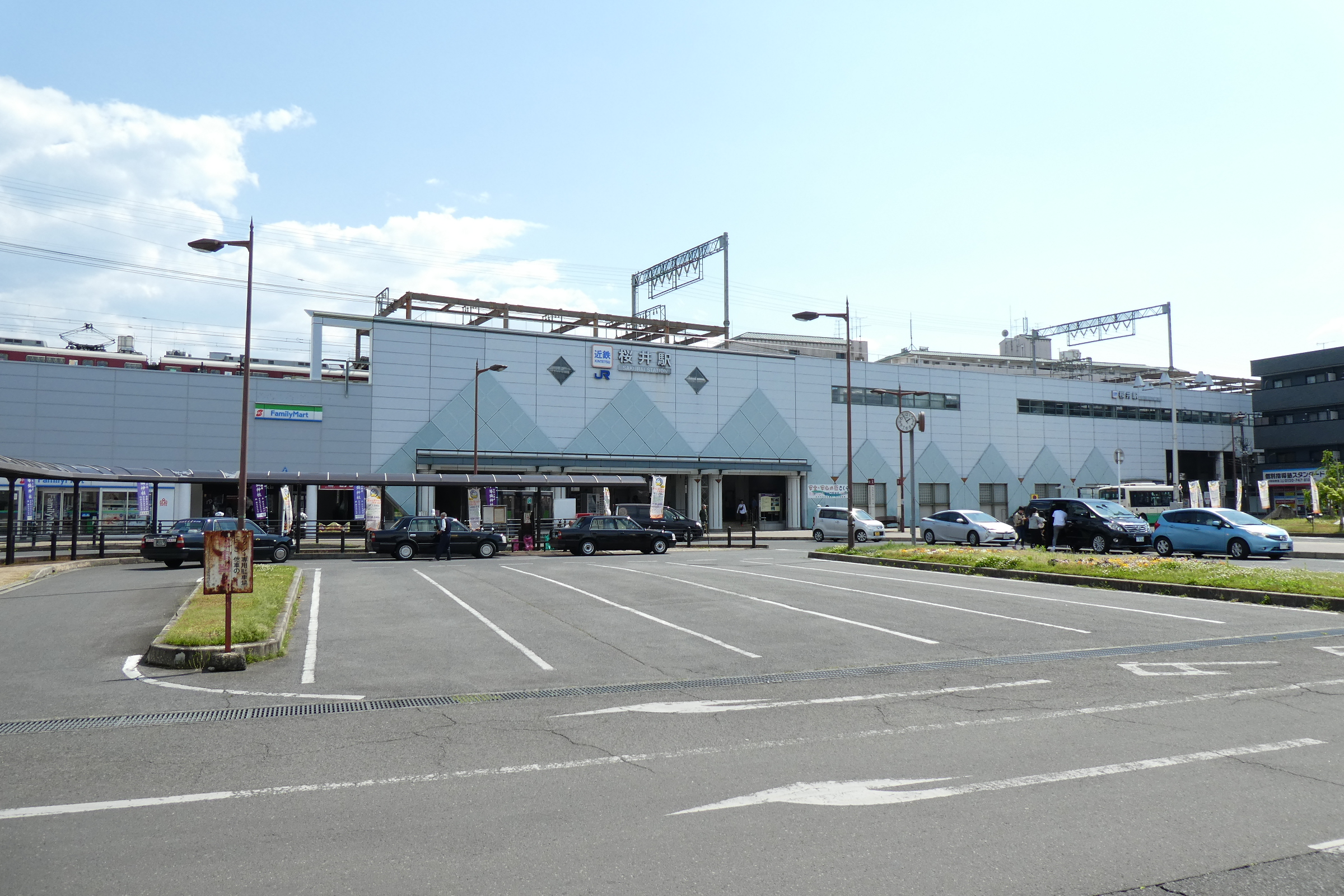 桜井線、近鉄大阪線桜井駅。北口。